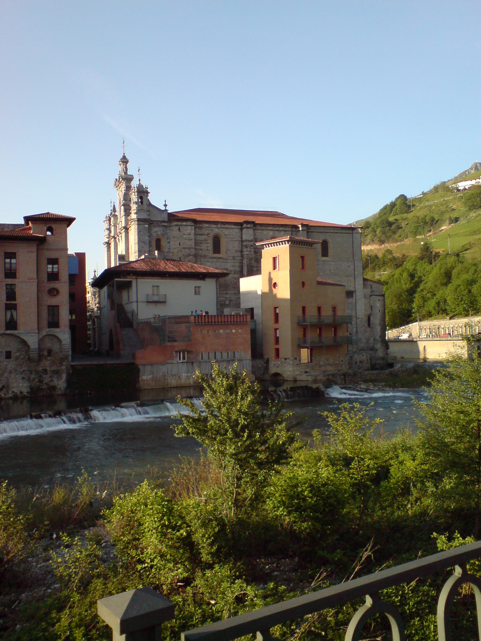 Tolosa Molino t detrás Iglesia de Santa María